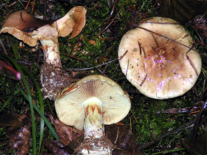 Cortinarius percomis - Cortinariaceae